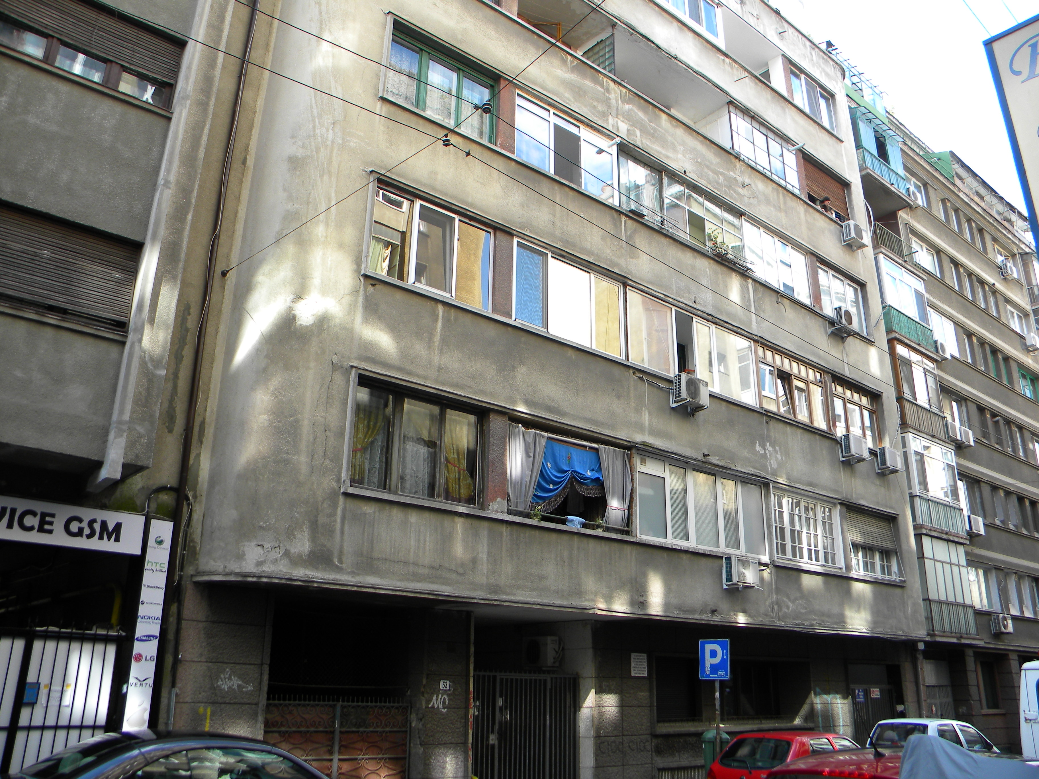 Imobil pe strada Ion Brezoianu nr. 53, Bucuresti sect. 1